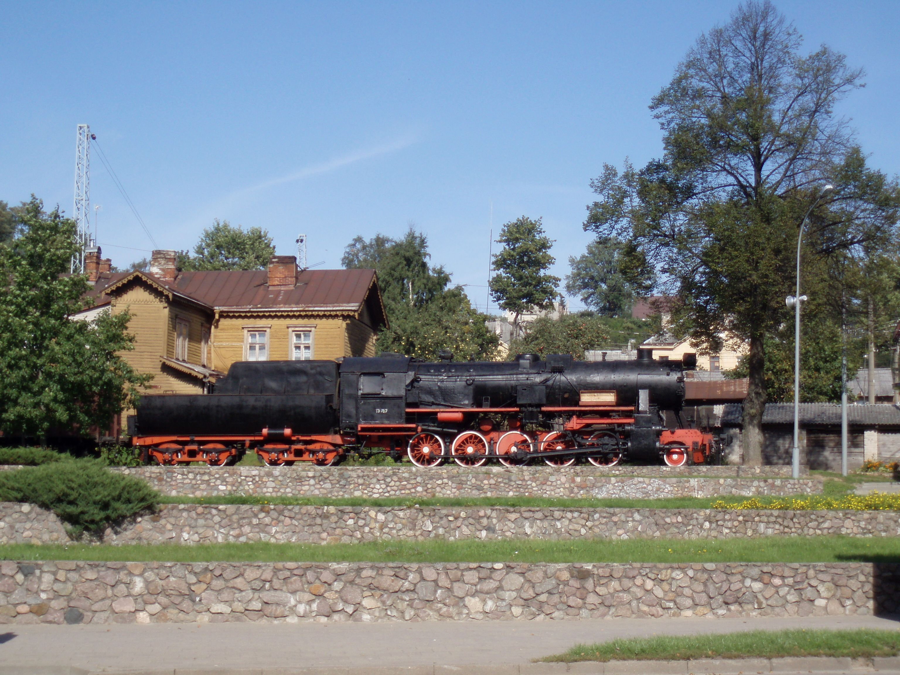 Vilnius, Naujoji Vilnia, paminklas tremtiniams, prie traukinių stoties, paskutinė stotelė Lietuvoje (Vilnius, Naujoji Vilnia, memorial for exiles near trainstation, old locomotive used by USSR to deport thousands of people to Siberia, last station in Lithuania)